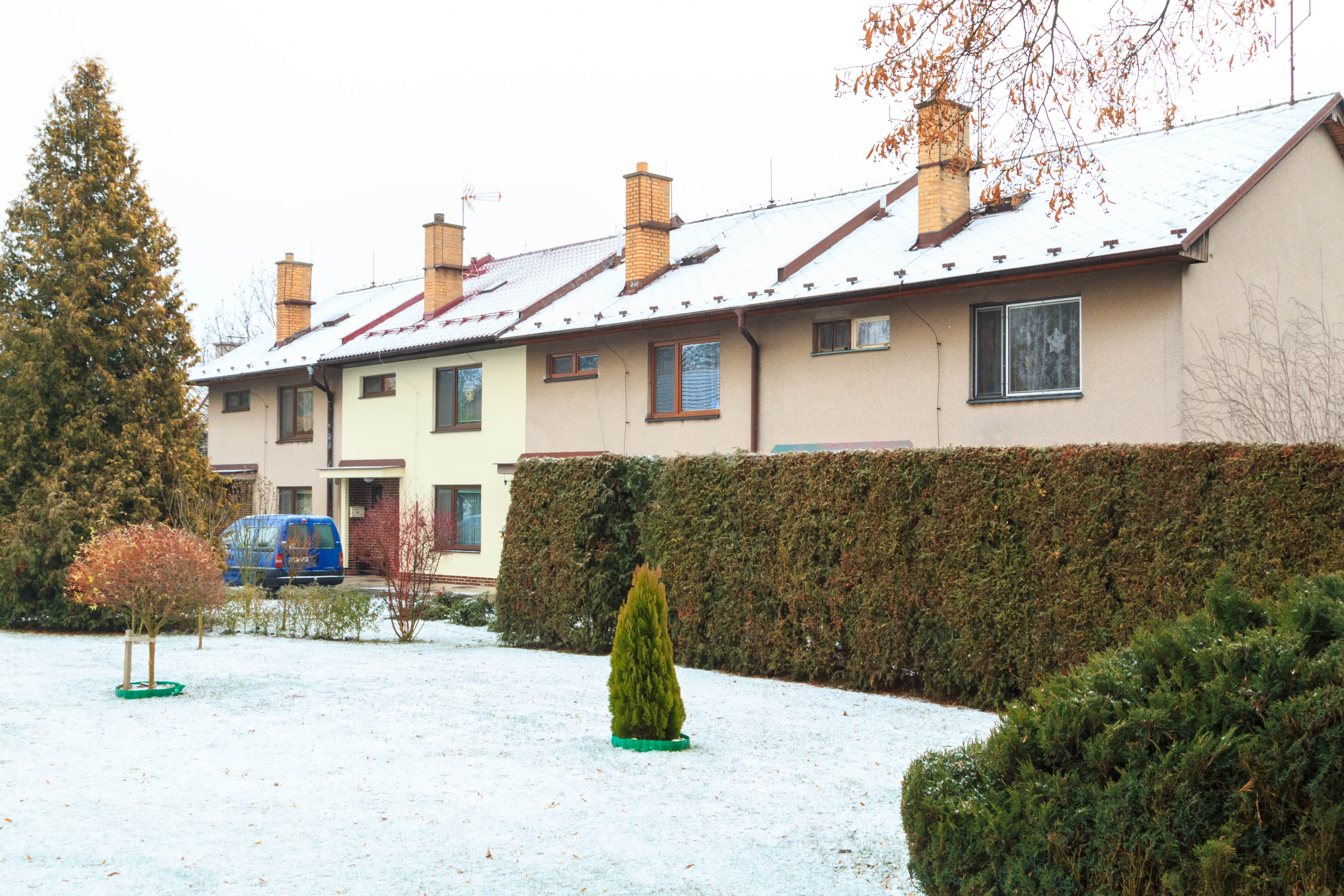 Synkov - čp. 66